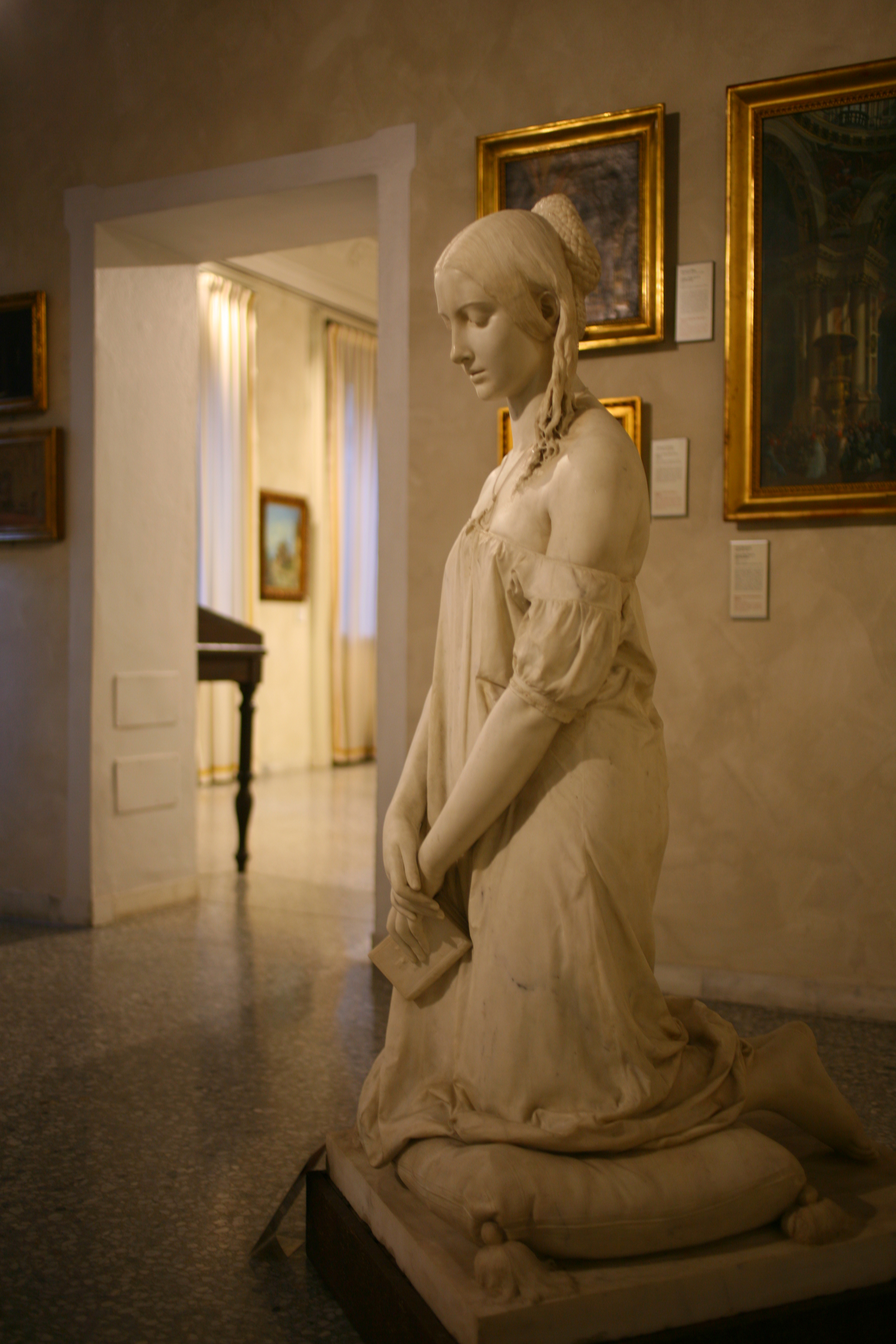 Vincenzo Vela (1820-1891) La preghiera del mattino, Palazzo Morando (marmo, 1846).jpg